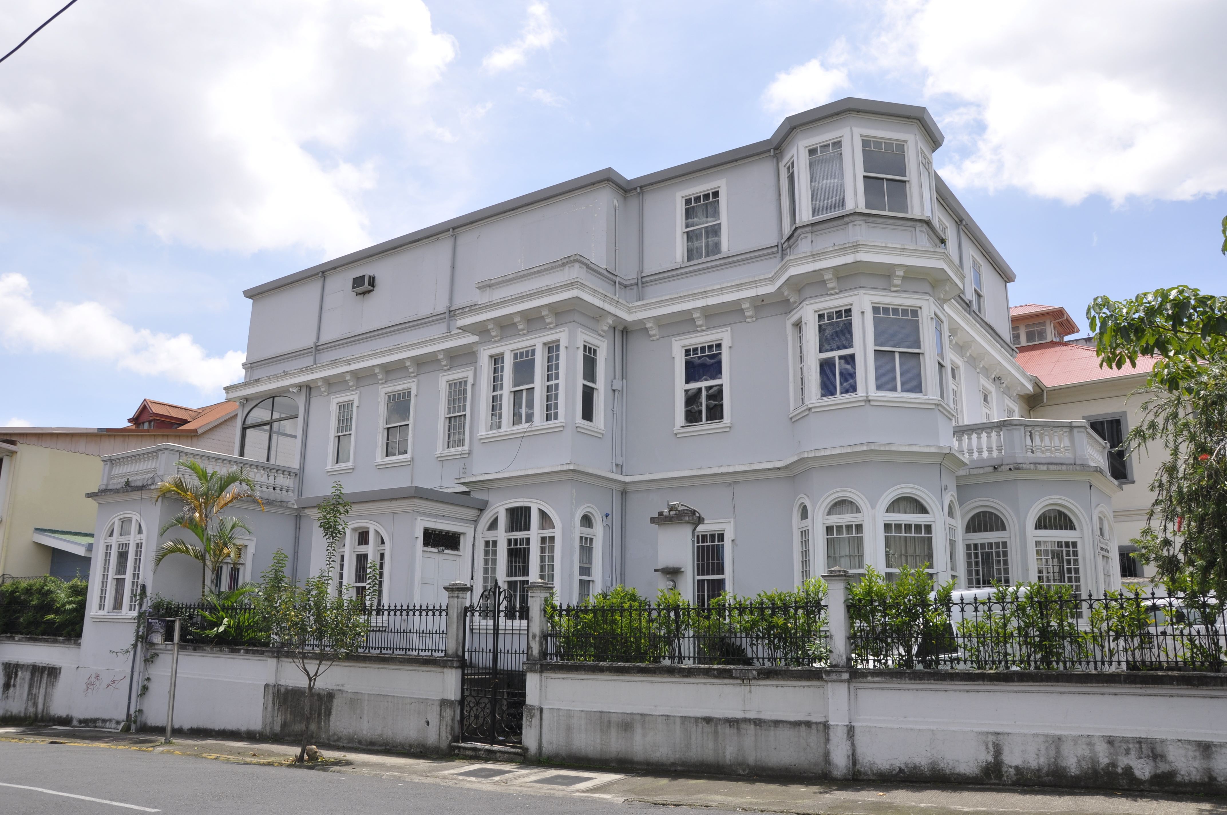 Centro Costarricense de Producción Cinematográfica, San José, Costa Rica. (Antigua legación americana).